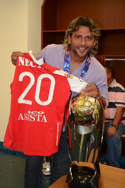 Gerardo Bedoya con la copa que lo acredita como campeón de la Superliga Postobon de campeones